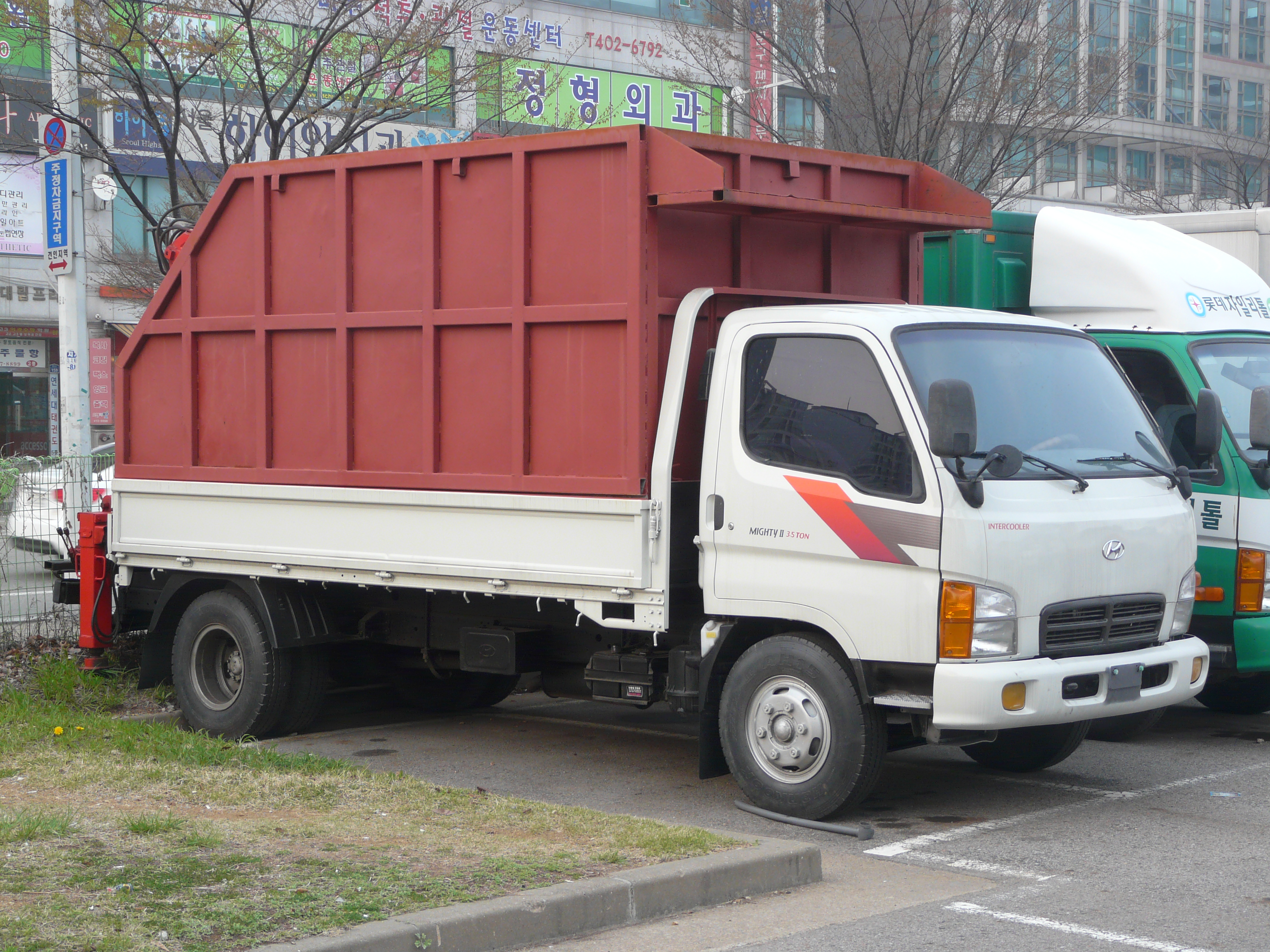 Vehicles in Ansan, Gyeonggi-do